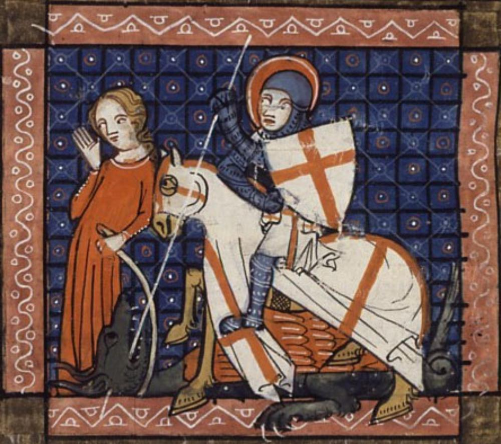 Miniature of St George and the Dragon, ms. of Legenda Aurea, dated 1348, BNF Français 241, fol. 101v.